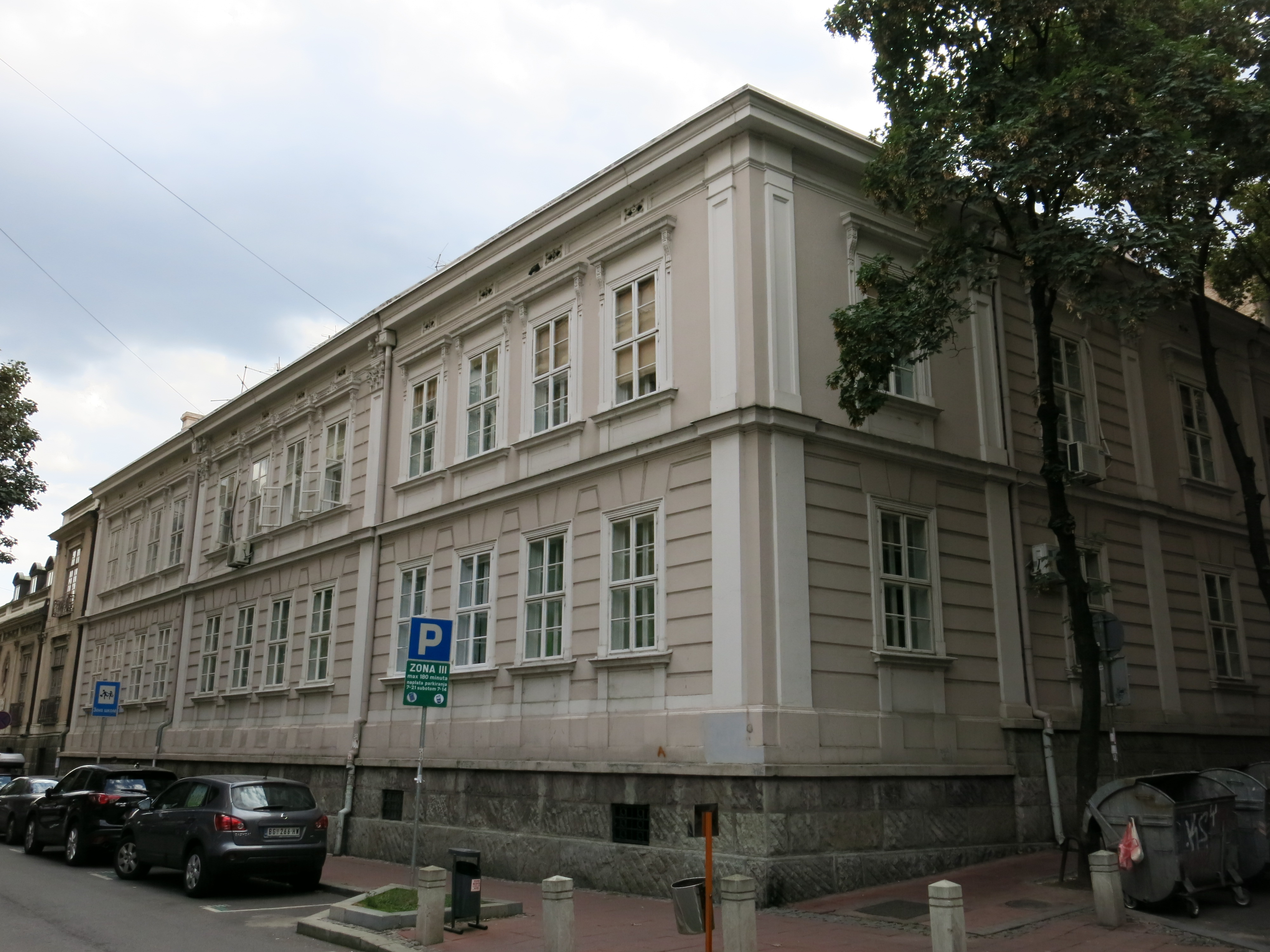 Кућа Стевана Мокрањца